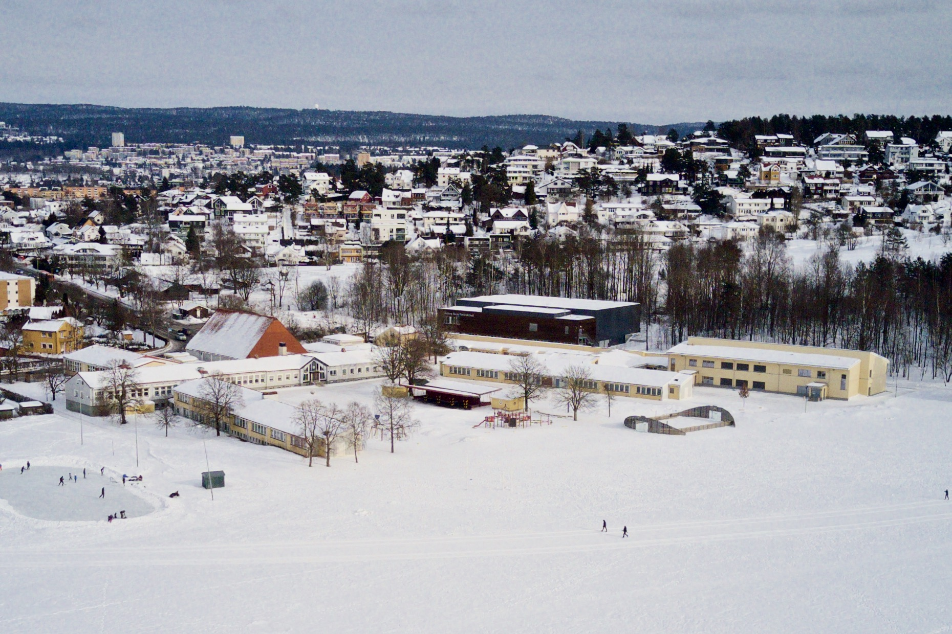 Ekeberg skole i Oslo.